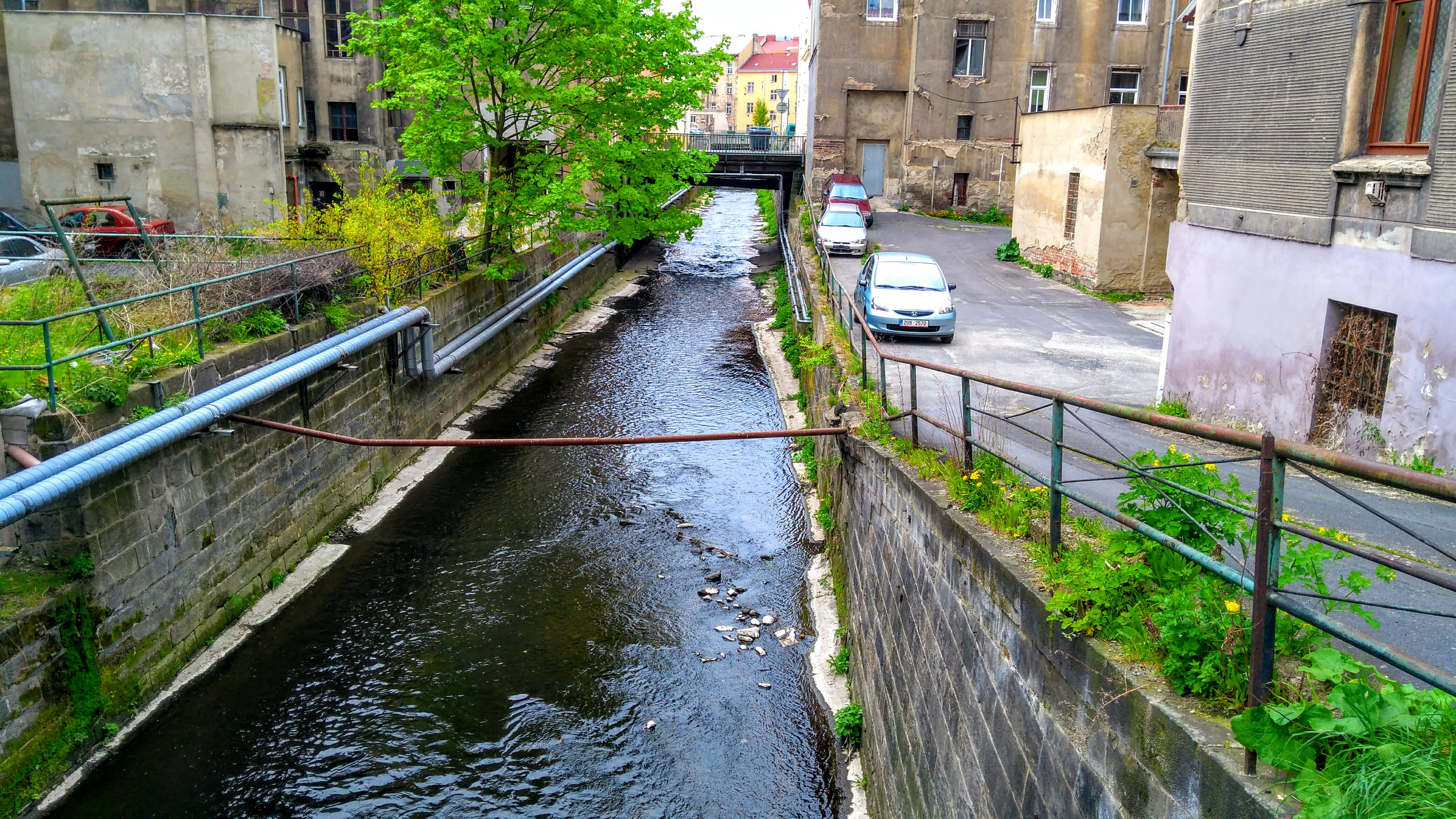 Potok.